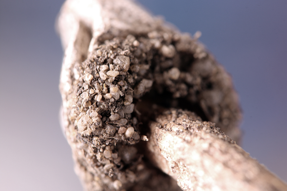 Tulostoma fimbriatum, Peridienunterseite mit Sand